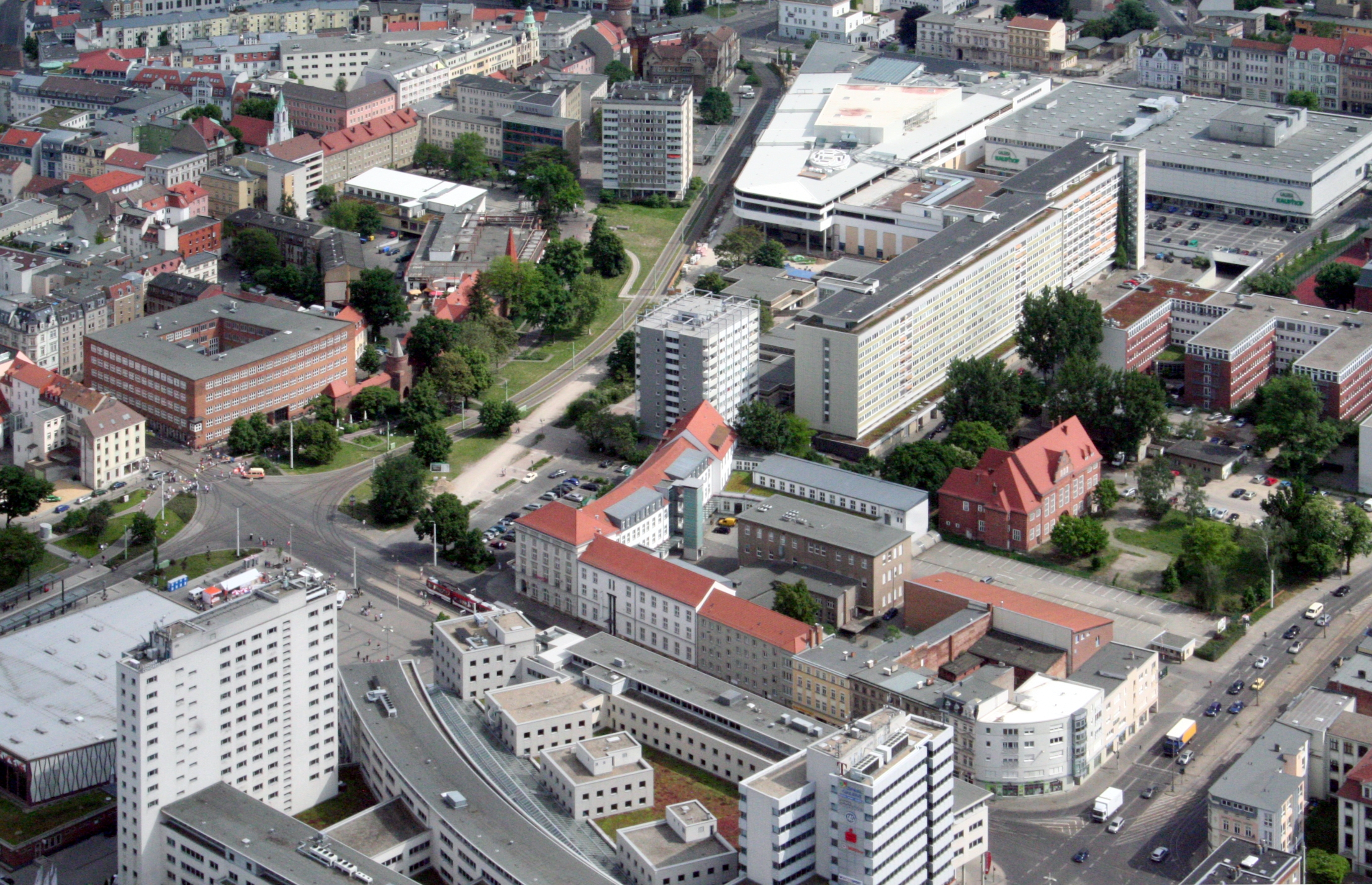 Cottbus Zentrum